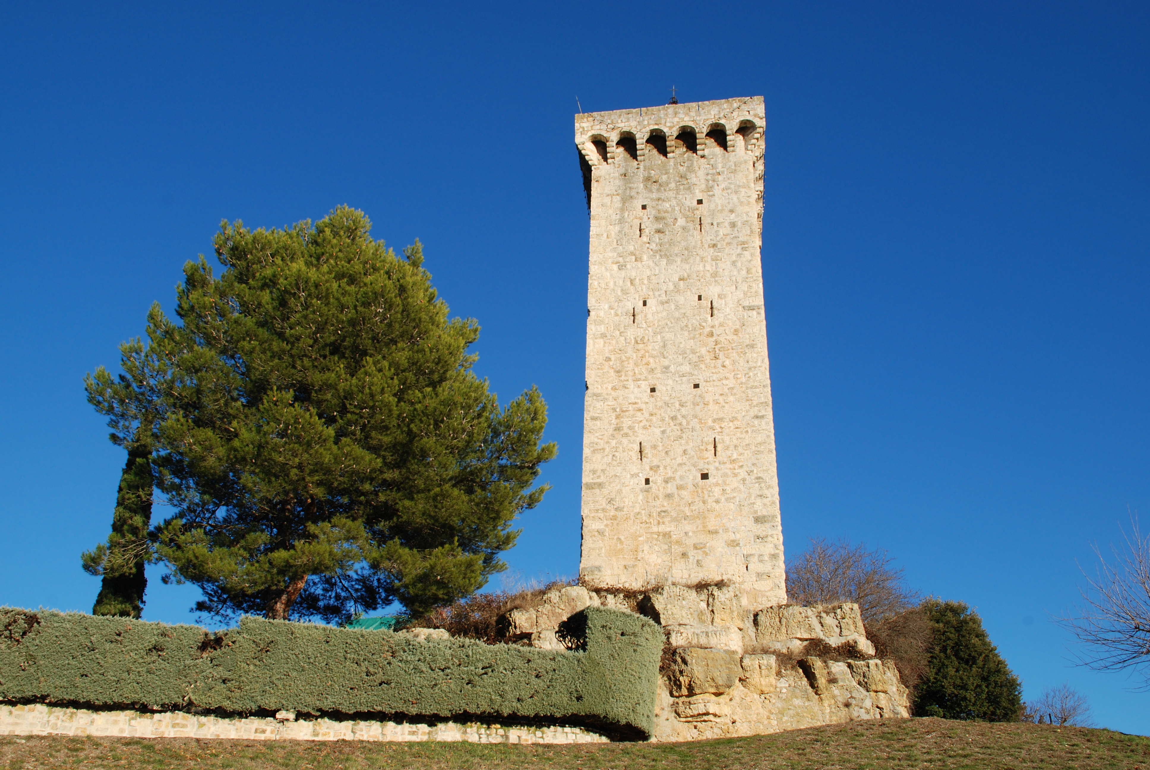 France - Provence - Tour de l’horloge de Saint-Martin-de-Brômes